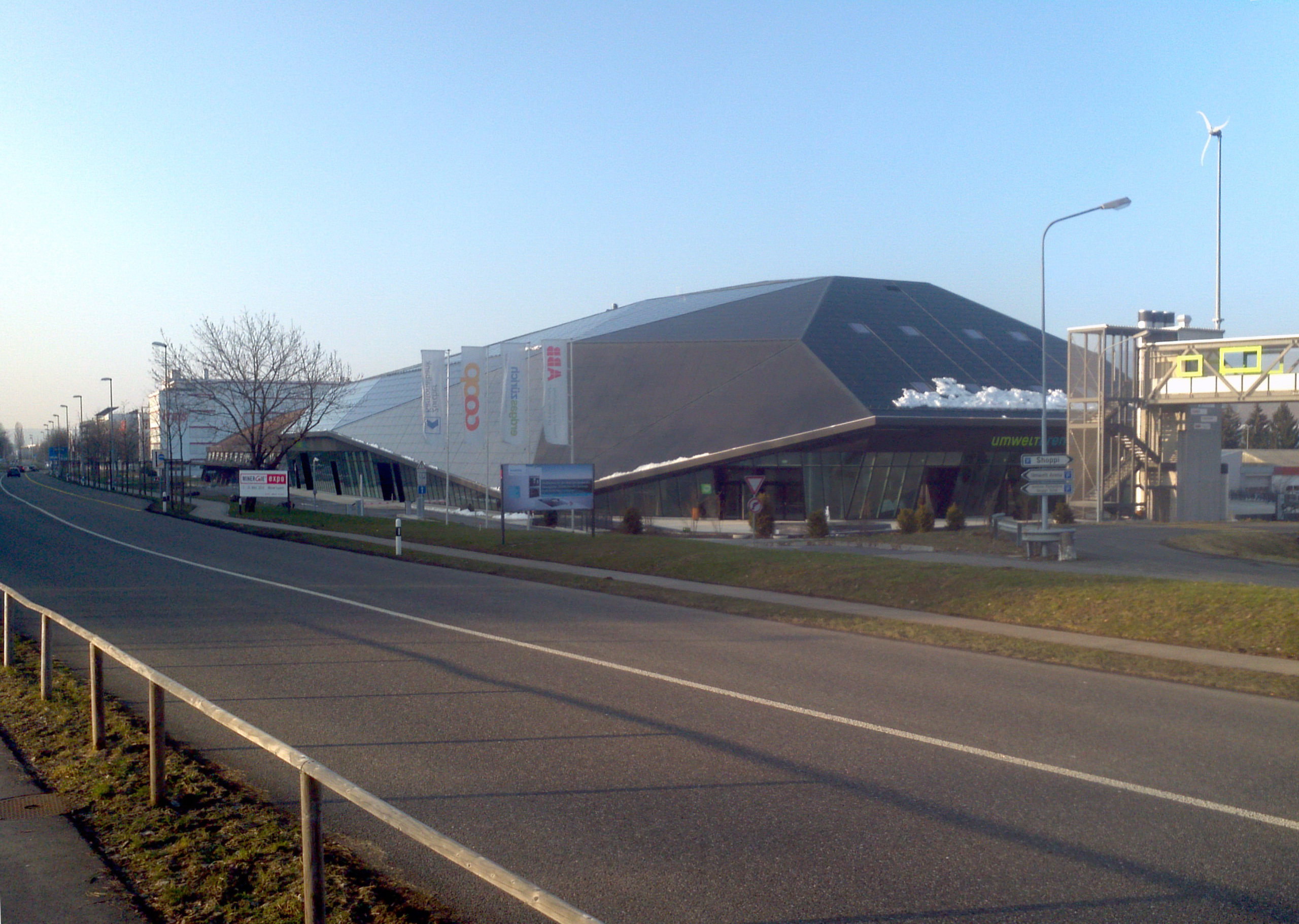 Umweltarena, Spreitenbach, Totale von Süden